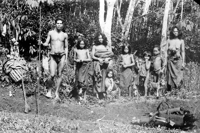 Repronegatief. Een groep Koeboes mannen, vrouwen en kinderen uit Djambi